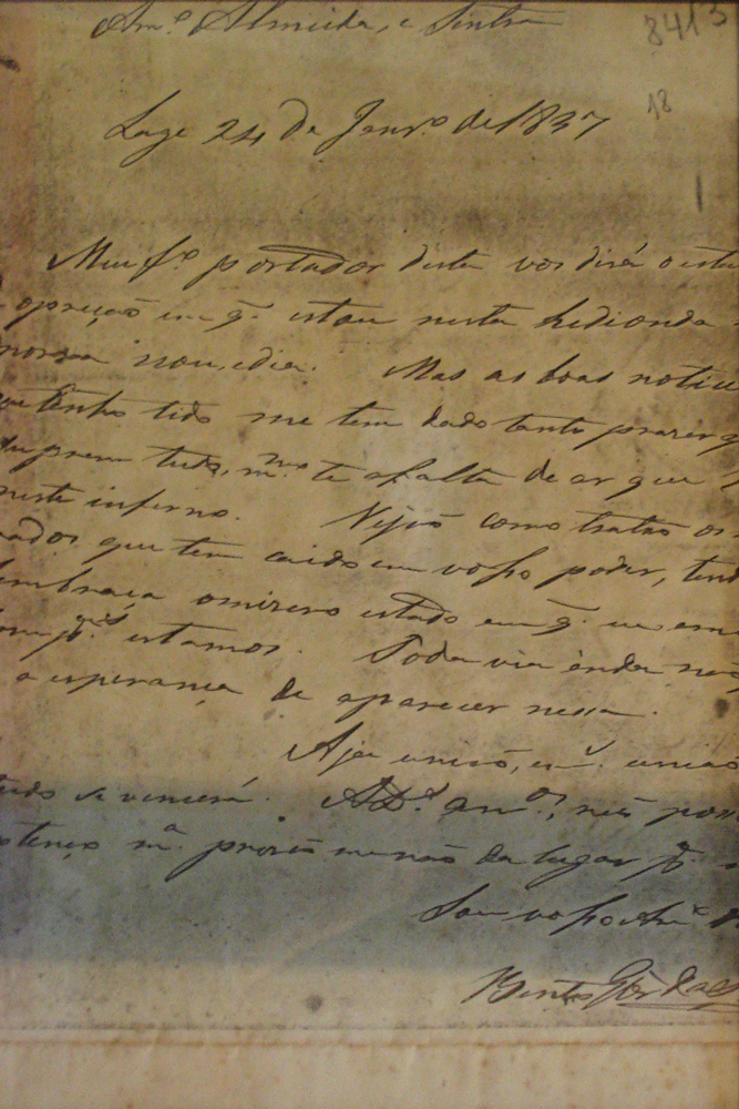 Carta de Bento Gonçalves escrita na prisão do Forte da Lage, endereçada a Domingos José de Almeida e José Pinheiro de Ulhoa Cintra, respectivamente o Ministro do Interior e Fazenda e o Ministro da Justiça e dos Estangeiros do governo Farroupilha. Museu Farroupilha, Triunfo, RS. A transcrição é: "Amº (amigo) Almeida, e Sintra Lage 24 de Jan.ro de 1837. Meu f.º (filho) portador desta vos dirá o estado de opreção em q~ (que) estou nesta hedionda masmorra nou (noute/noite) e dia. Mas as boas notícias que tenho tido me tem dado tanto prazer que suprem tudo, m.mo (mesmo) te (até) a falta de ar que há neste inferno. Vejão como tratão os malvados que tem caído em vosso poder, tendo lembrança o misero estado em q~ eu e meus comp.ros (companheiros) estamos. Todavia inda não perdi a esperança de aparecer nessa. Aja união, e mais união, tudo se vencerá. Adeus am.os (amigos), não posso ser extenço m.a (minha) prisão não me dá lugar p. (para) mais. Sou vosso am.o (amigo) obrigado Bento Gos. (Gonsalves) da Silva"